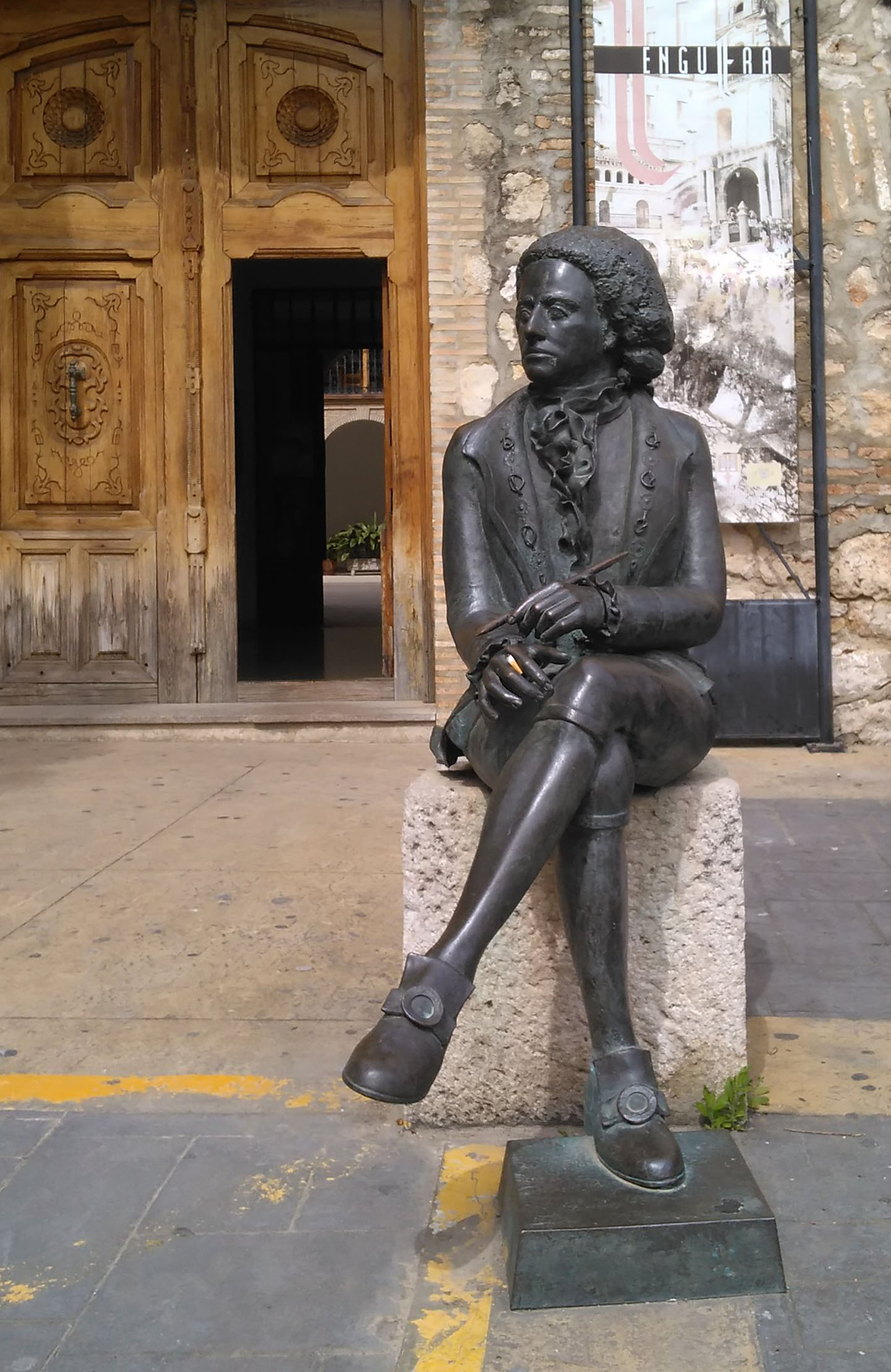 Estatua del arquitecto Manuel Tolsá, en la plaza que lleva su nombre en su localidad natal: Enguera (Valencia, España).